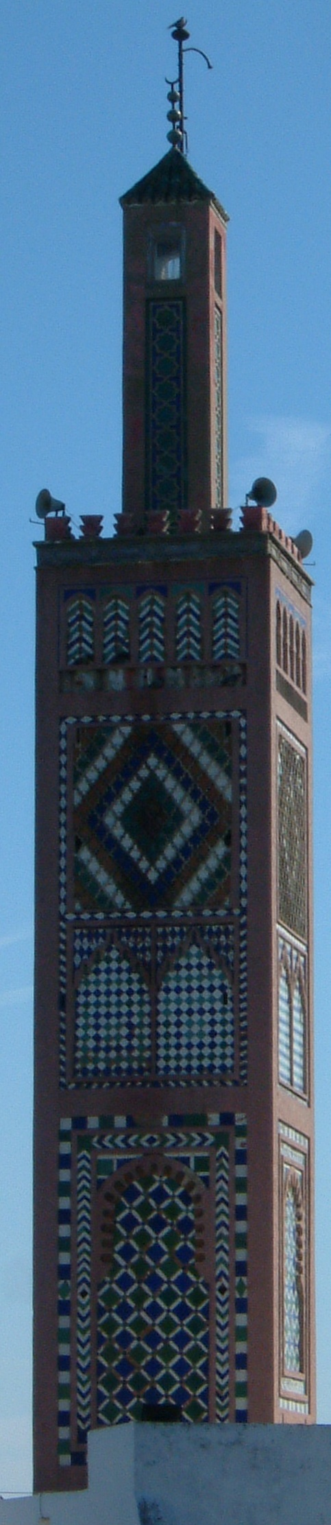 Tanger: Moschee